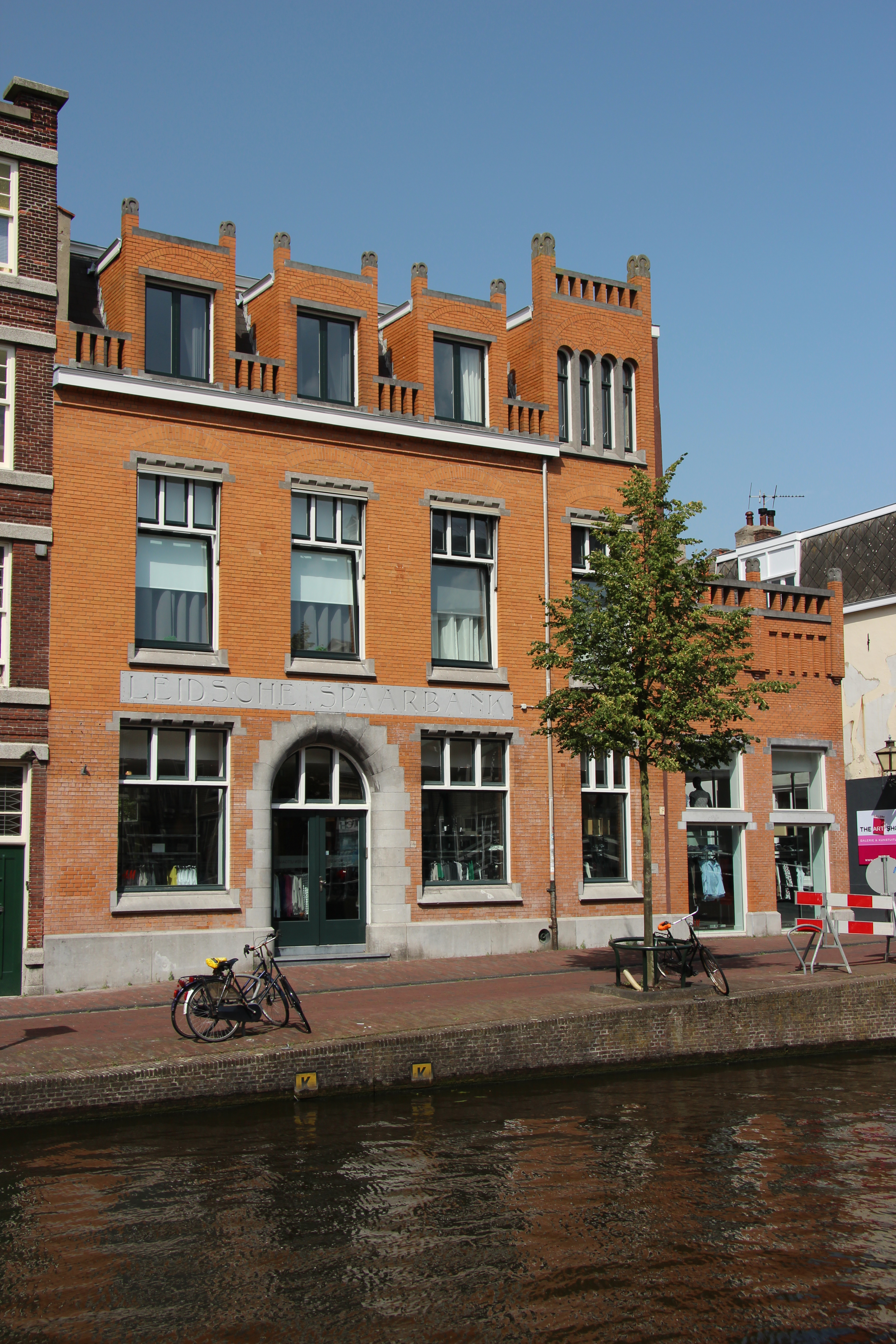 Oude Rijn 56 Leiden. De Leidsche Spaarbank (sinds 1966 geheten de Leidse Spaarbank) werd op 15 oktober 1818 opgericht door het Departement Leiden van de Maatschappij tot Nut van 't Algemeen. In 1877 betrok de bank een eerste eigen gebouw aan de Oude Rijn 56. Nadat ook Oude Rijn 58 was verworven verrees op deze plek in 1904 het nog steeds bestaande bankgebouw met de geveltekst Leidsche Spaarbank, naar een ontwerp van architect W.C. Mulder.